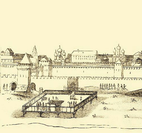 Водосвятие на Москва-реке.